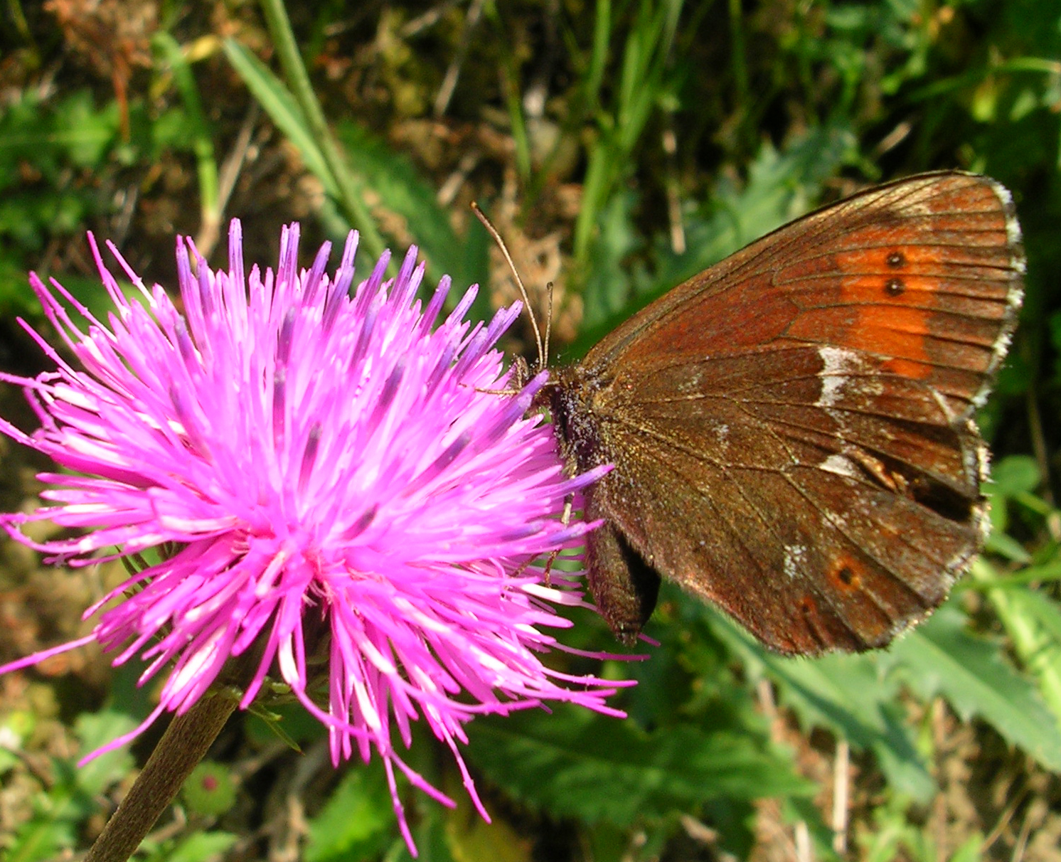 Weißbindiger Bergwald-Mohrenfalter (Männchen) im Virgental auf dem Weg zur Gottschaunalm oberhalb von Marin